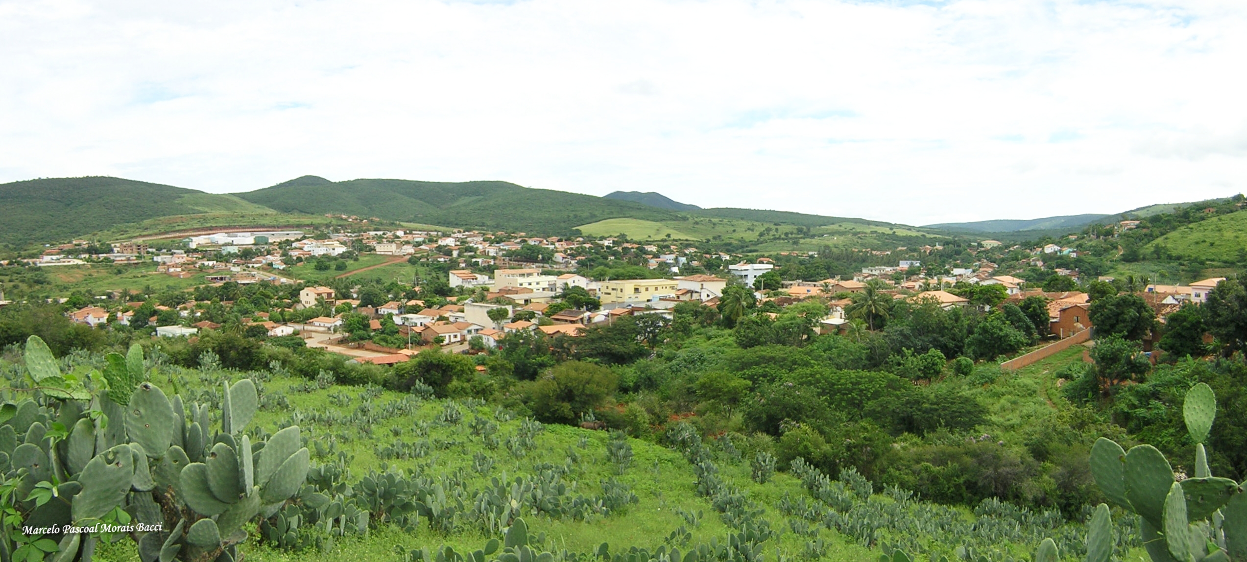 Descrição Vista de Urandi Fonte Marcelo Pascoal Morais Bacci